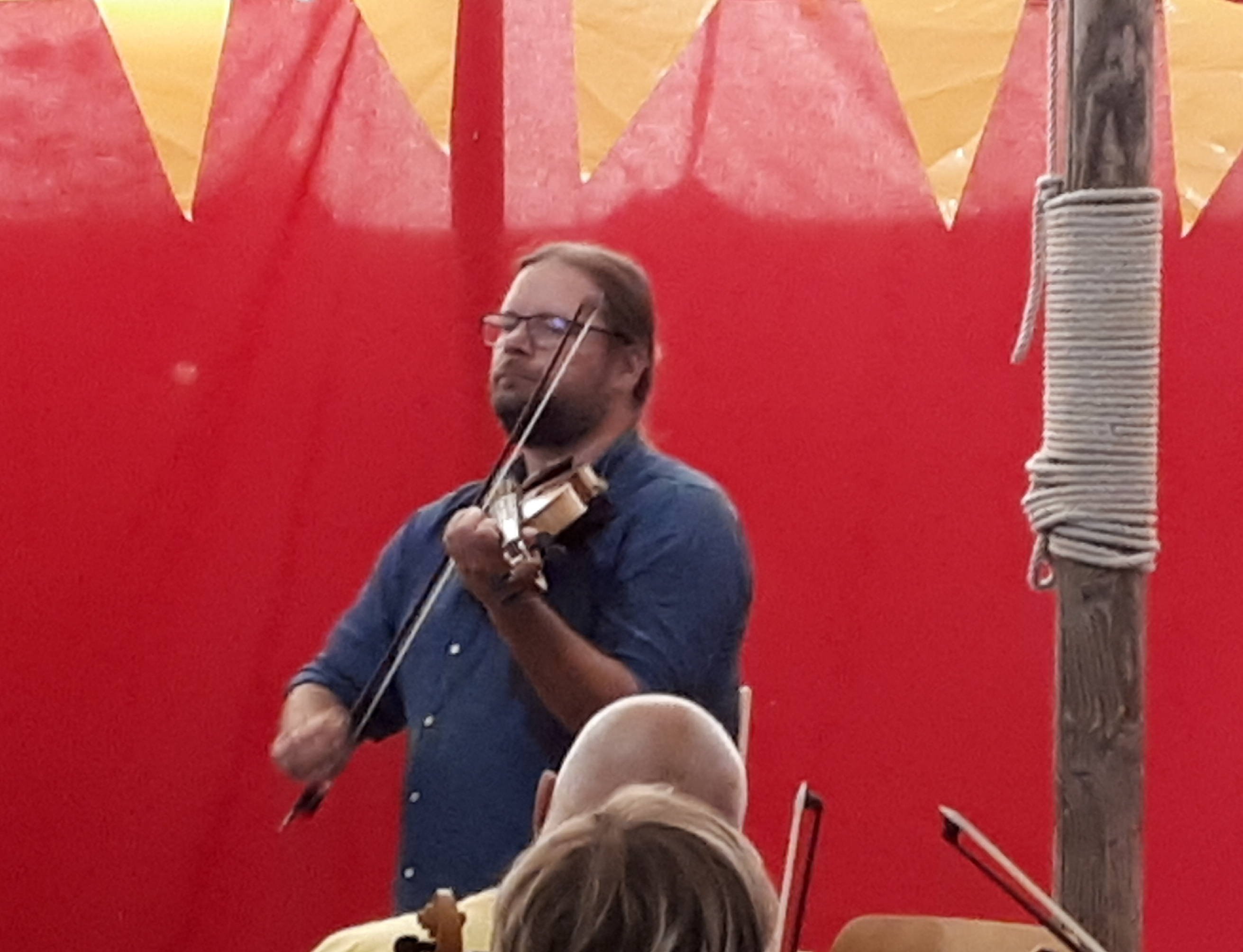 Kjell-Erik Eriksson håller låtkurs under Ornungastämman i cirkustältet söndag 12 augusti 2018.